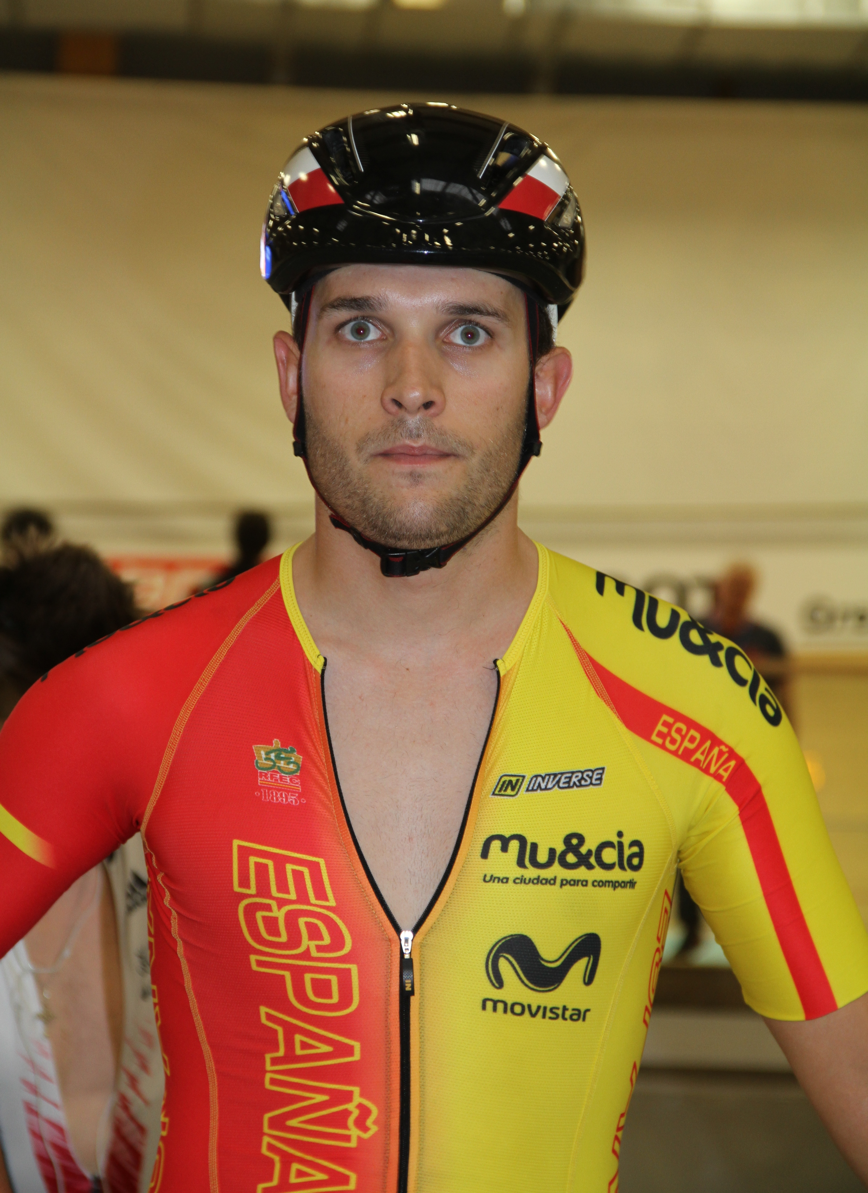 Illart Zuazubiskar Gallastegi, spanischer Radsportler The making of this document was supported by the Community-Budget of Wikimedia Germany.